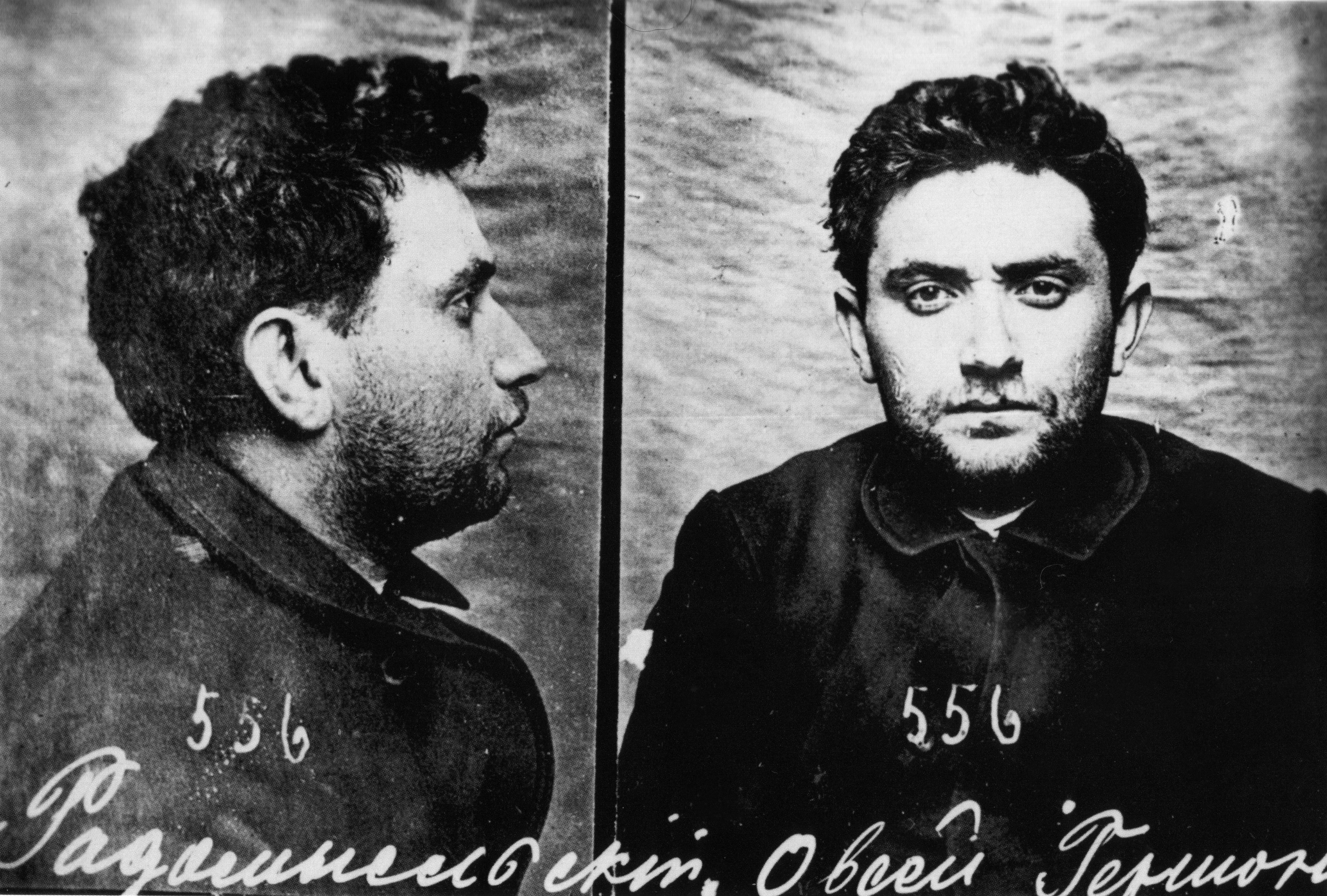 Fotografías de la ficha policial de Grigori Zinoviev, tomadas por las Ojrana durante su arresto en 1908.